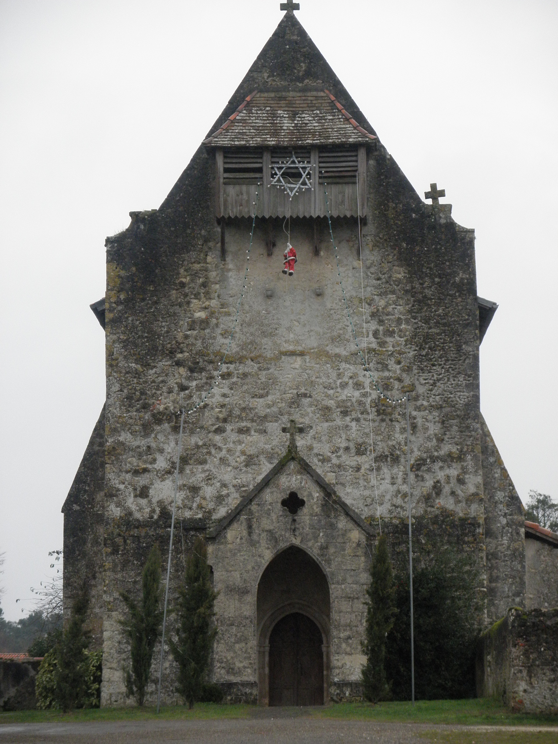 L'église de Vielle